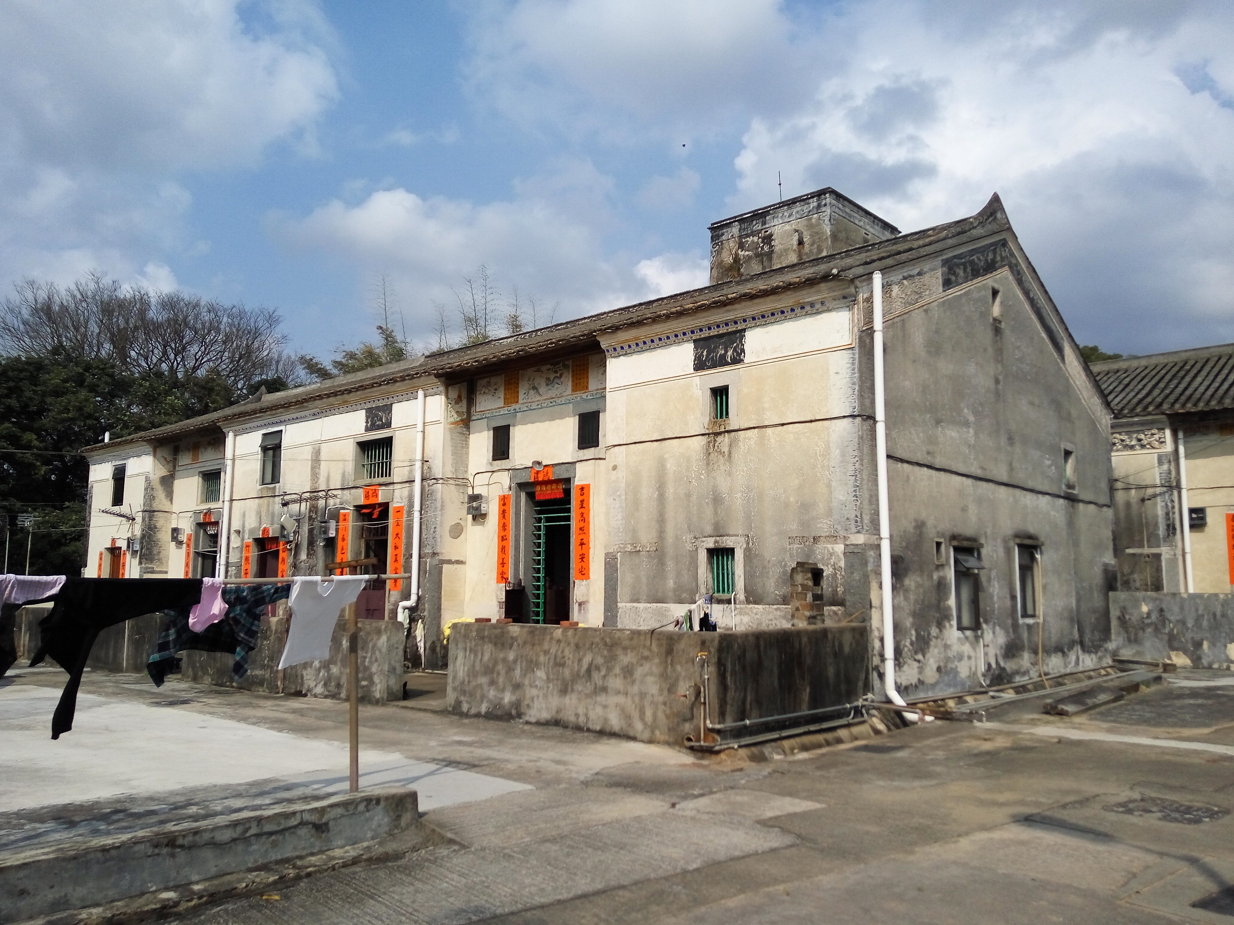 中文（香港）: 香園圍1A-3號